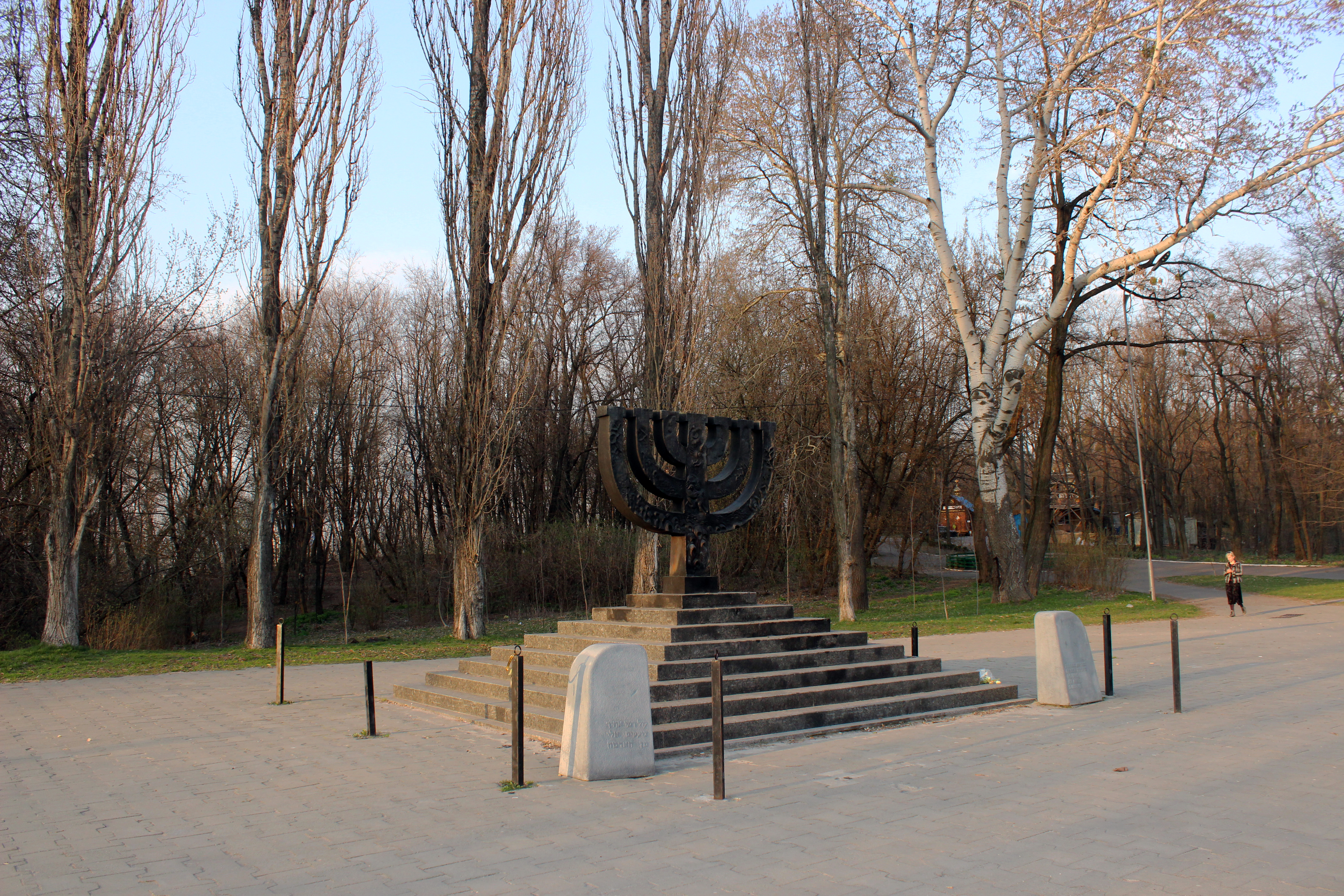 Парк «Кирилівський гай», Київ, Герцена вул.